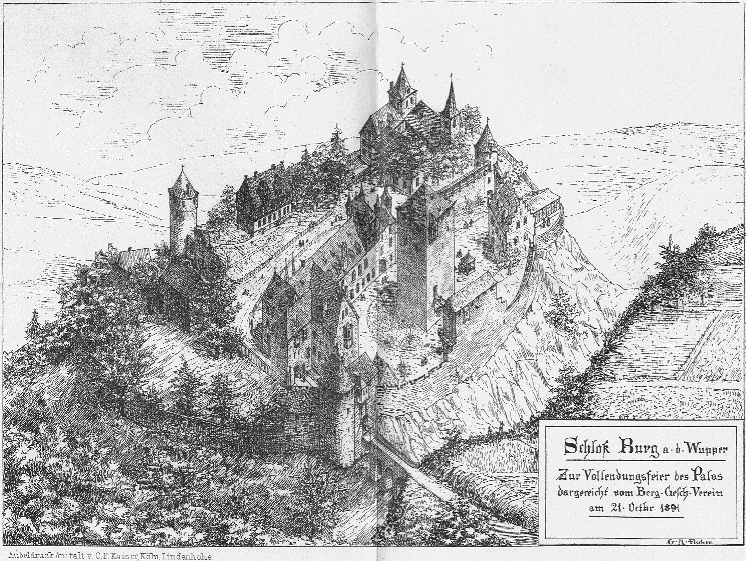 Geplanter Wiederaufbau von Schloß Burg